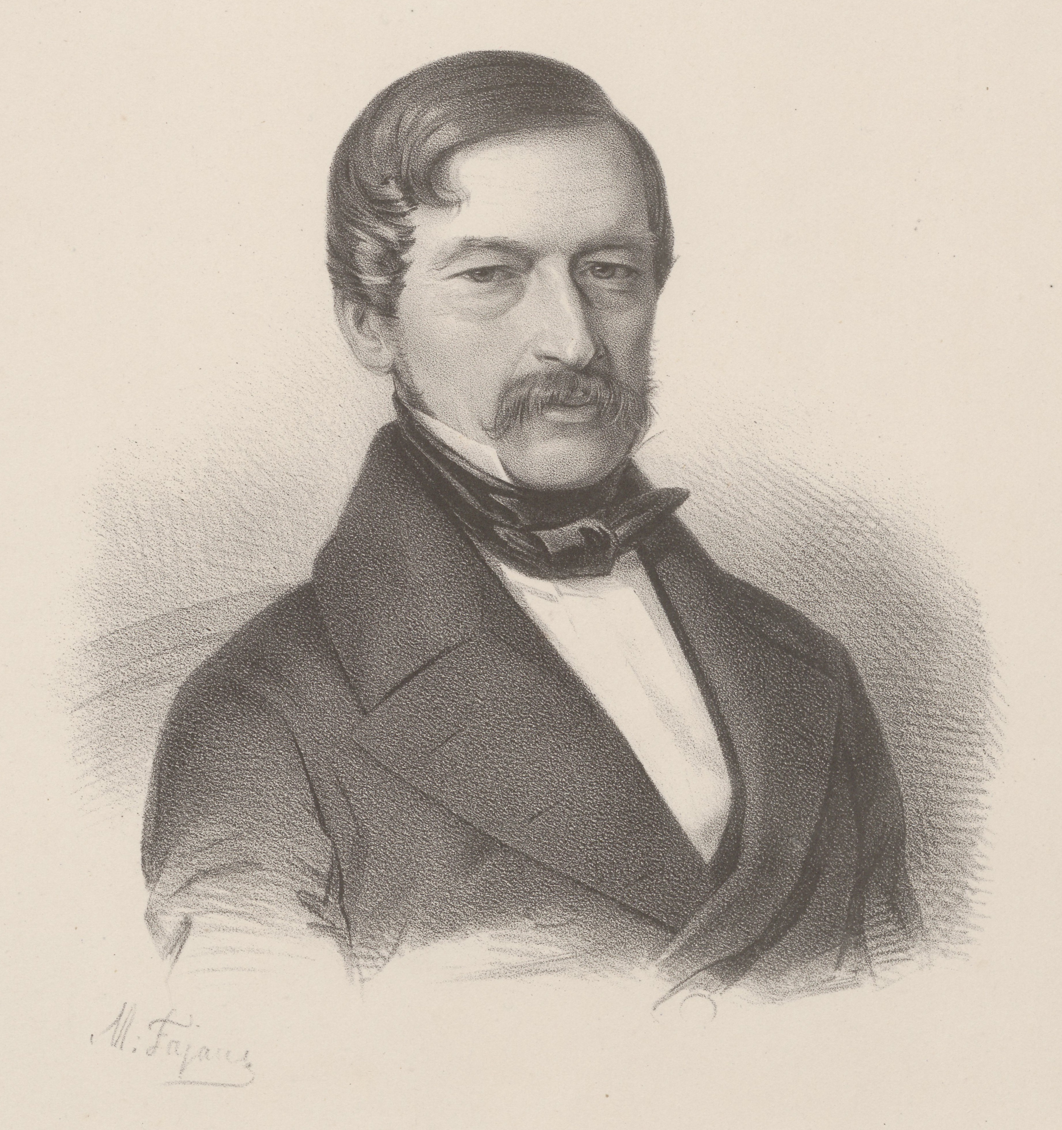 Portret Gustawa Zielińskiego rysowany z natury przez M. Fajansa. Litografia dwubarwna